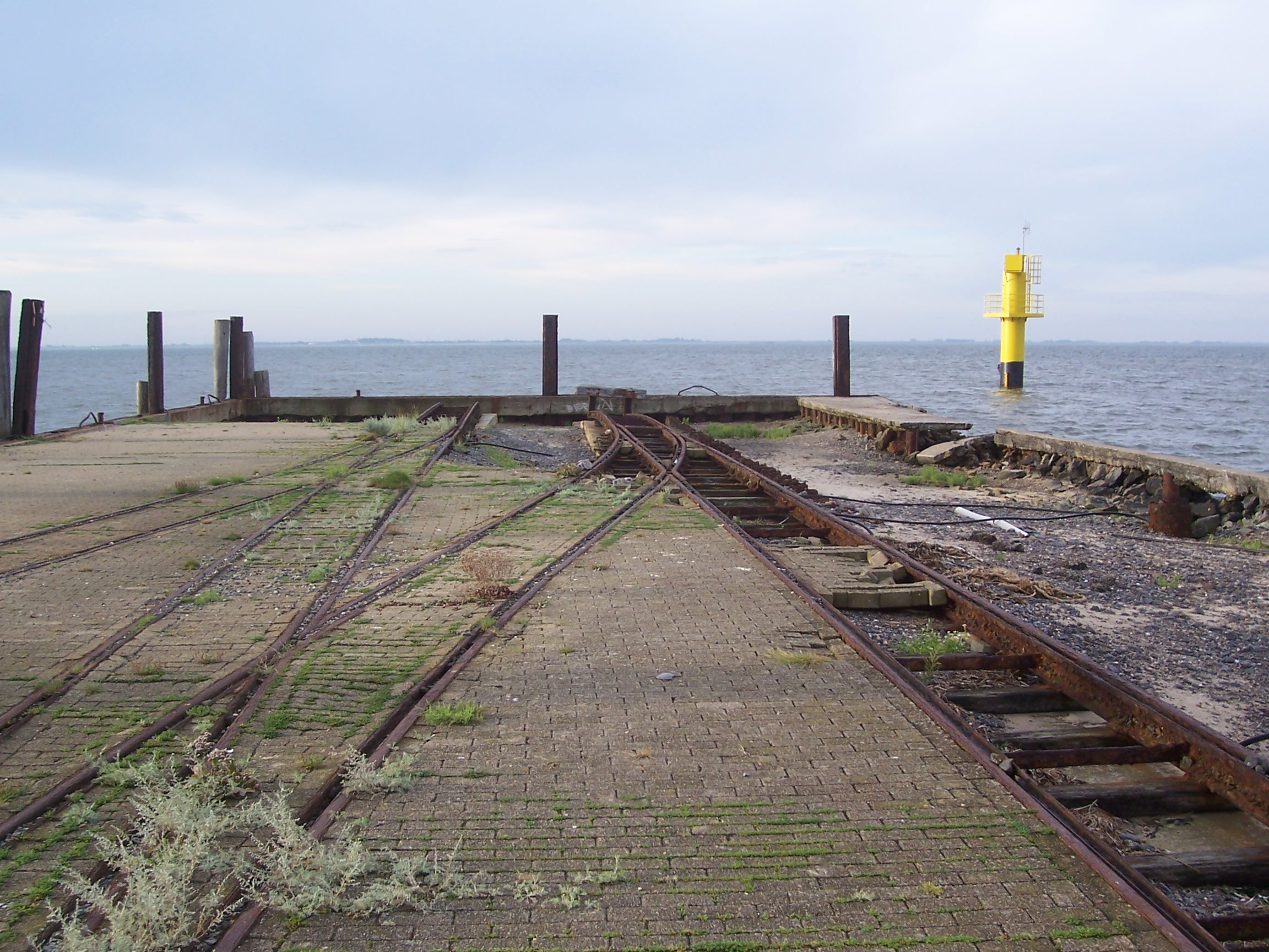 Alter Anleger Spiekeroog